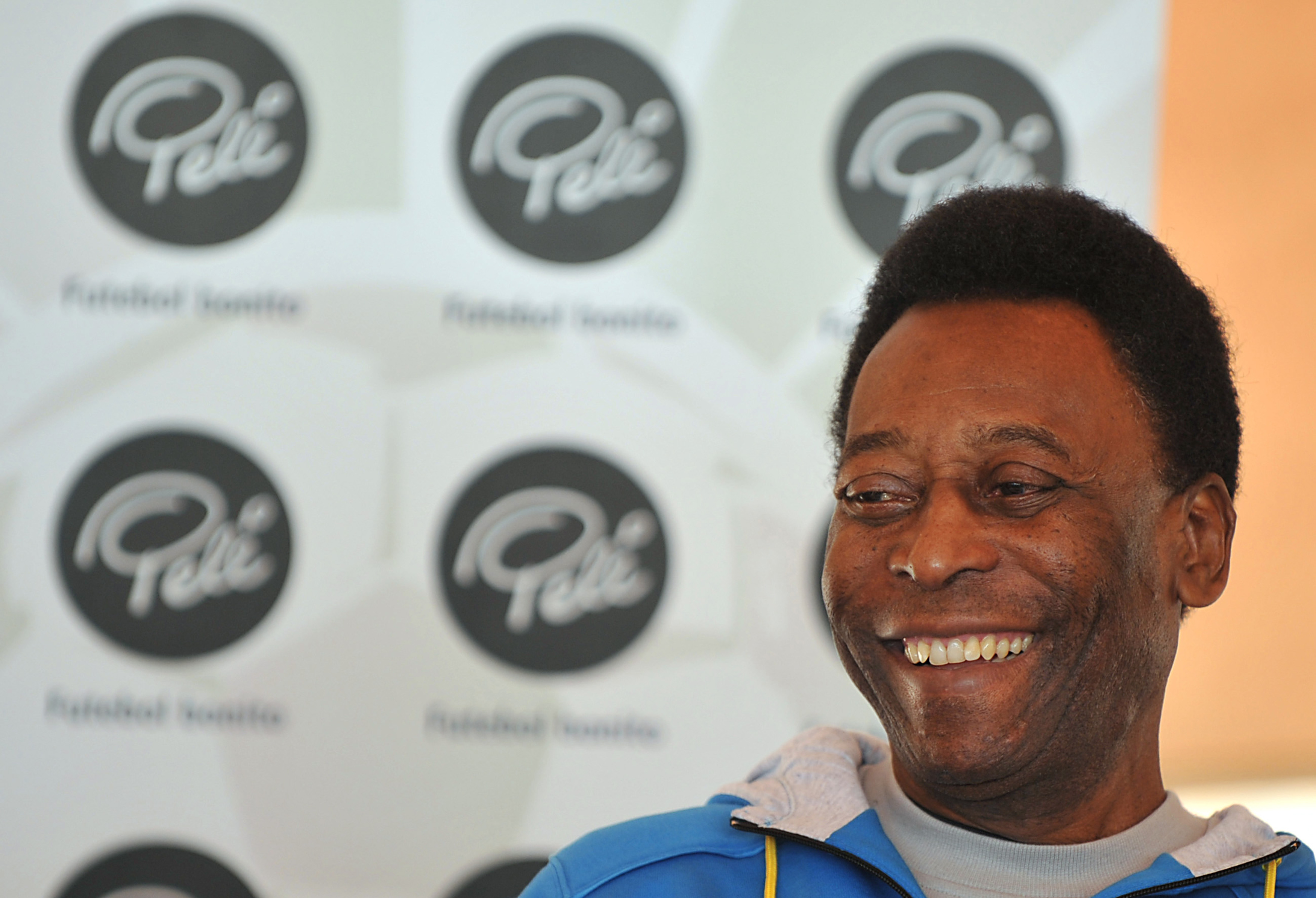 Pelé no encontro com crianças africanas, onde reforçou a importância da Copa na África do Sul. O rei do futebol ainda aproveitou o evento para incentivar as crianças a praticarem o esporte.